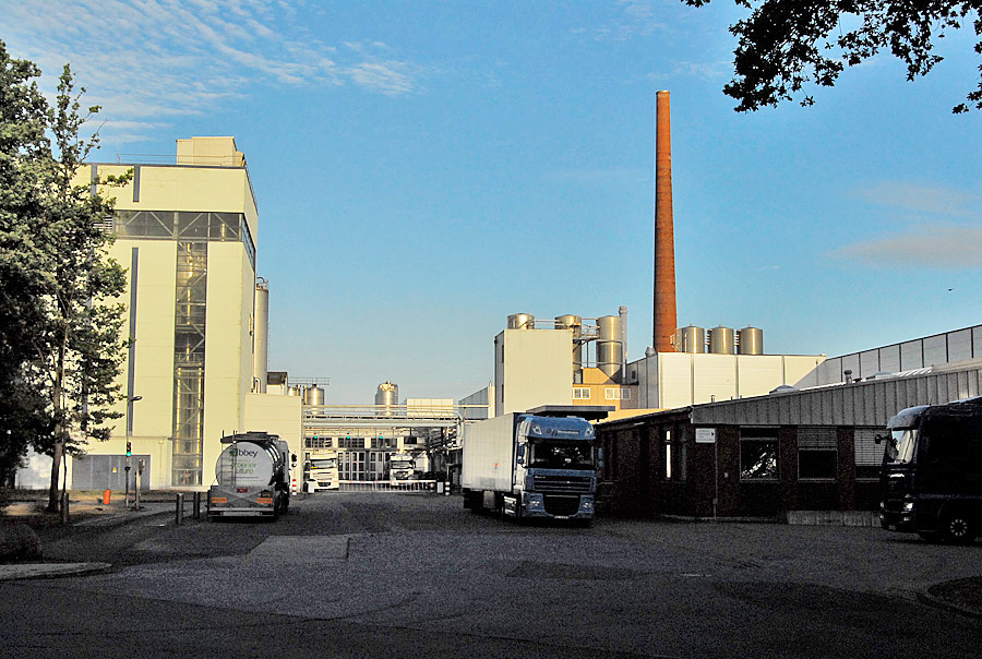 Zeven Aspe dmk